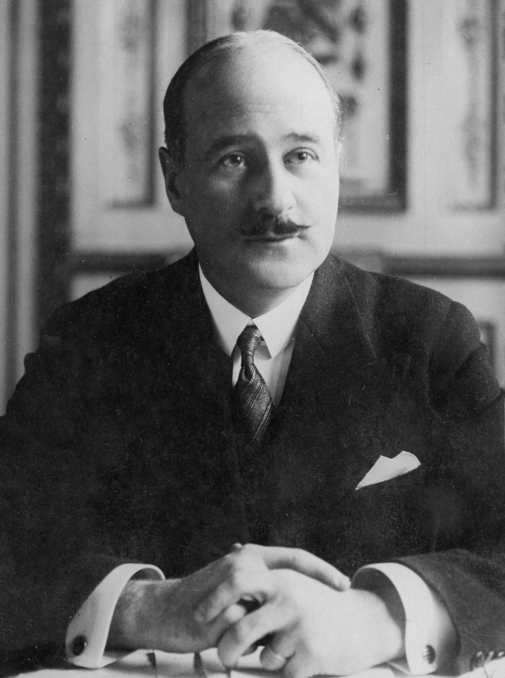 "André François PONCET Ambassadeur à Berlin 1931" Photo originale G. DEVRED /ROL